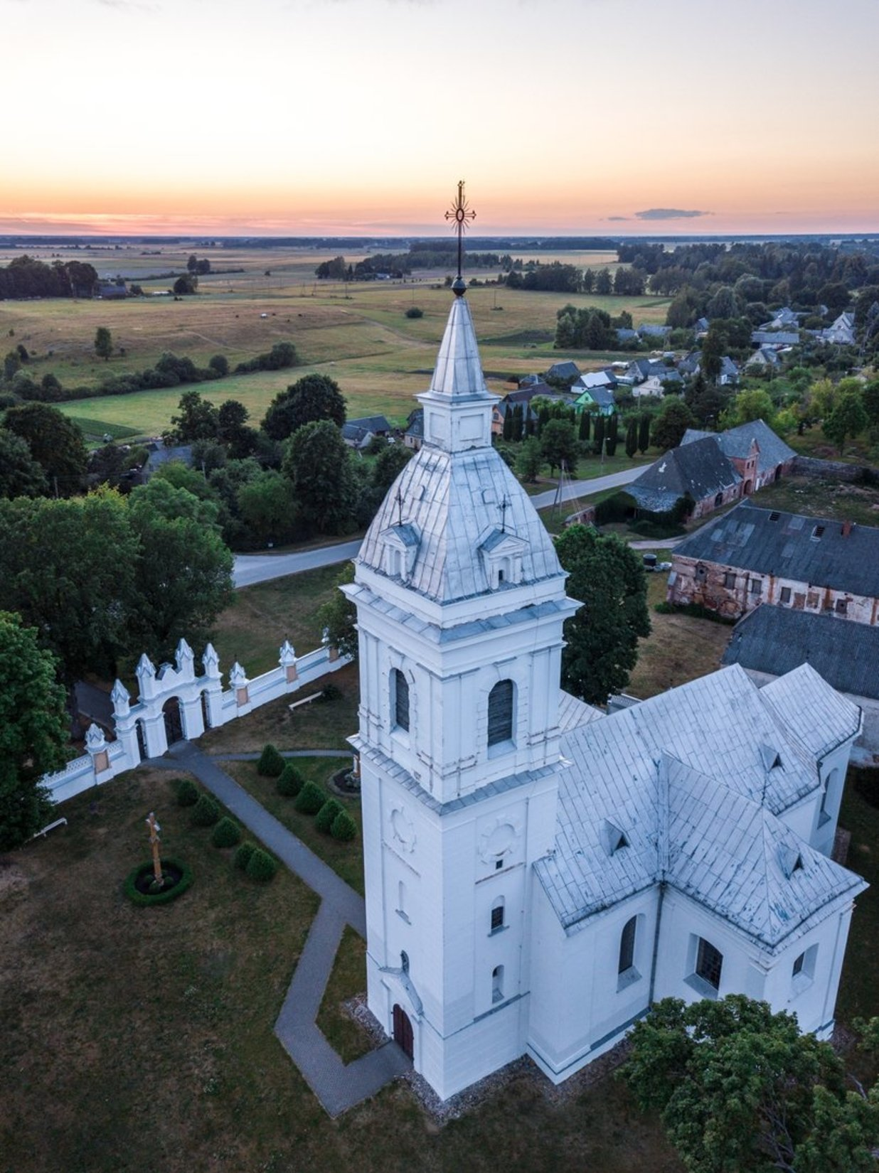 Palėvenės bažnyčia